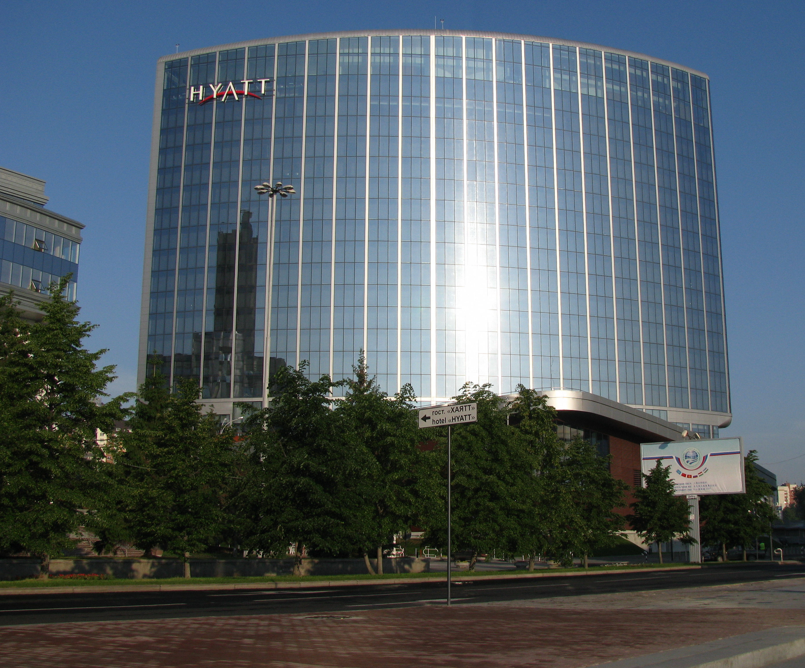 Пятизвёздочный отель Hyatt Regency в Екатеринбурге, построенный в 2009 году.